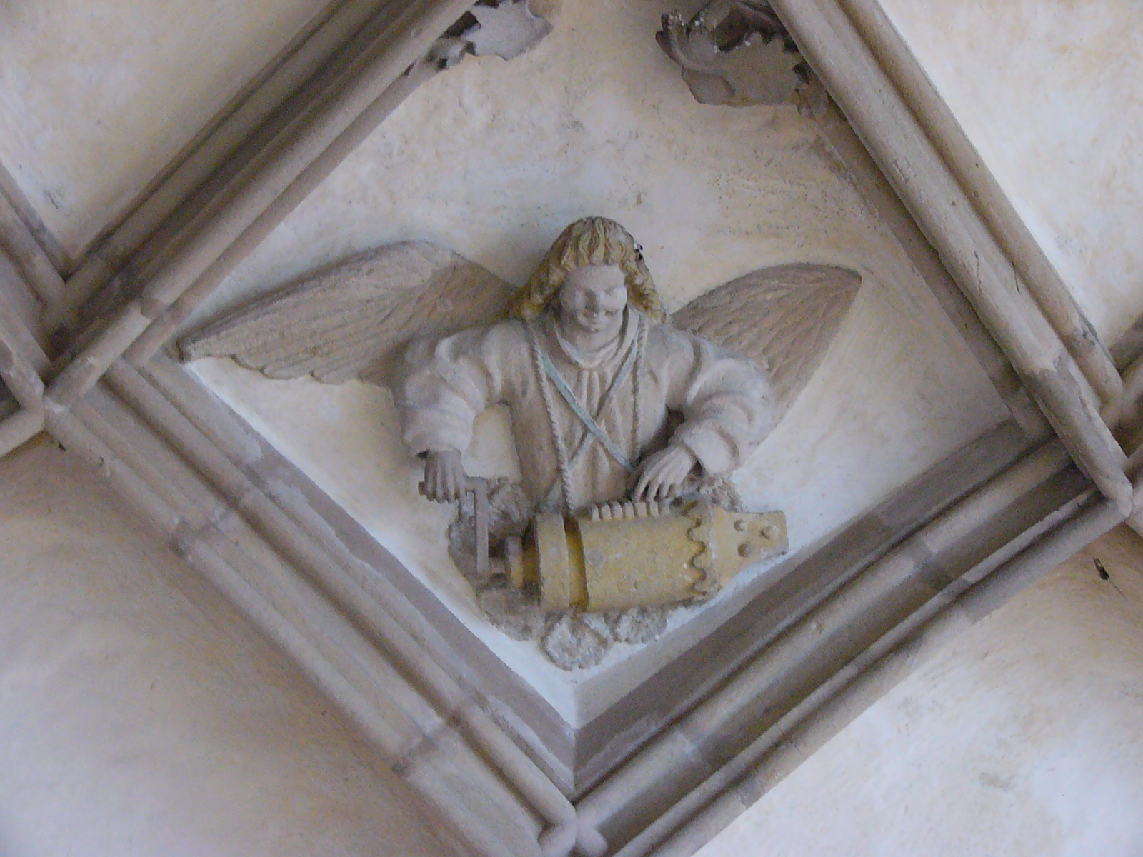 Musizierende Engel im Gewölbe des Himmelkroner Kreuzgangs